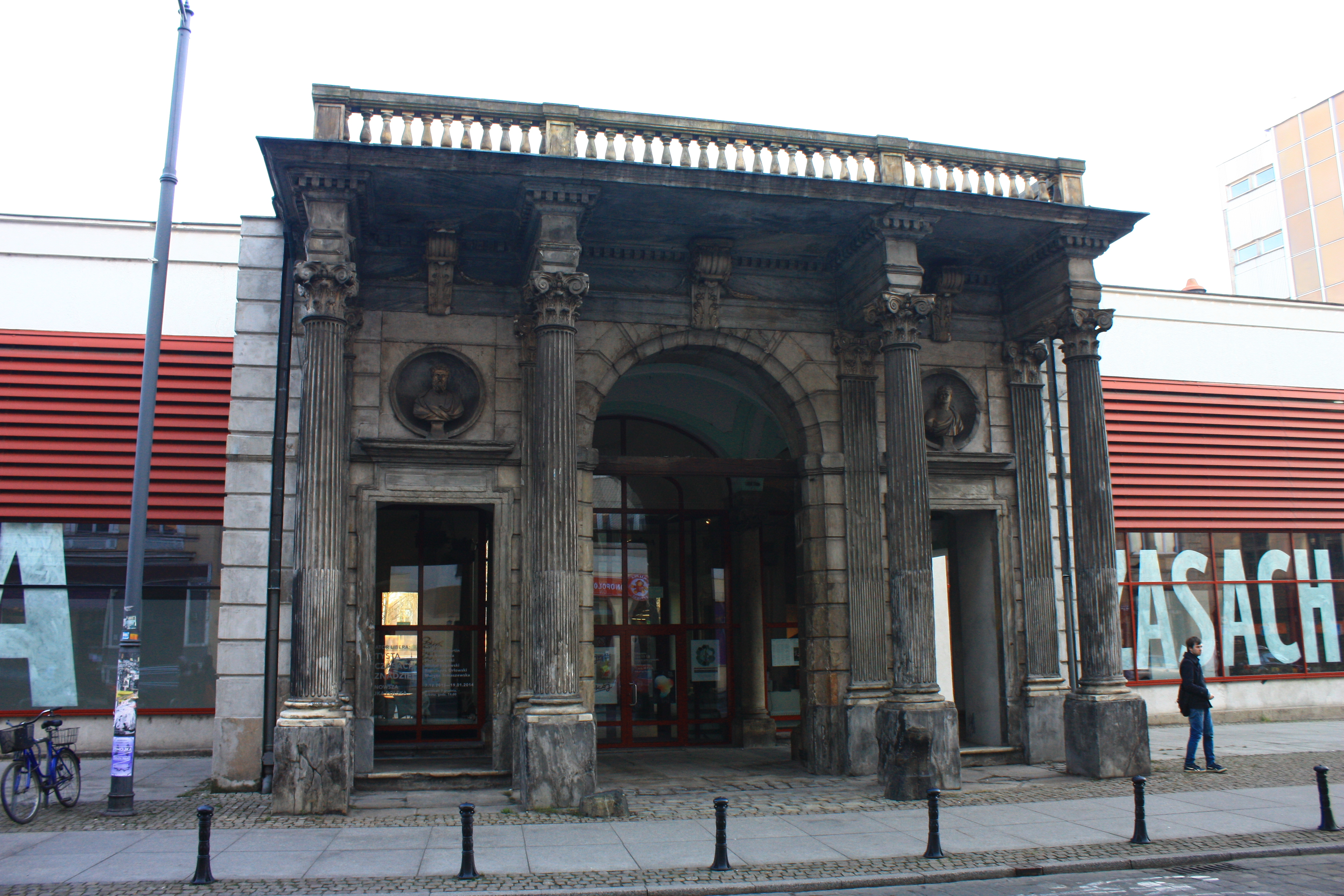 Wrocław, pałac Hatzfeldów, ob. Galeria BWA (portyk)